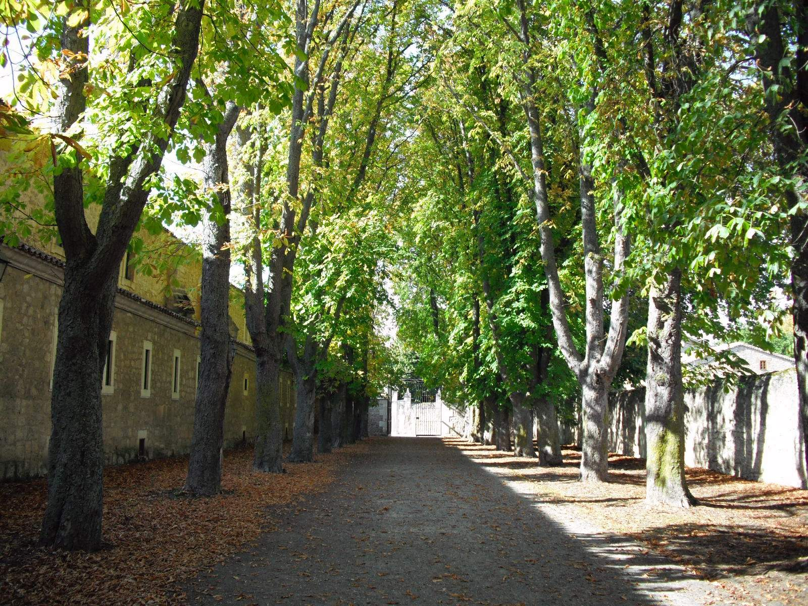 Hospital del Rey-Universidad de Burgos (Burgos)